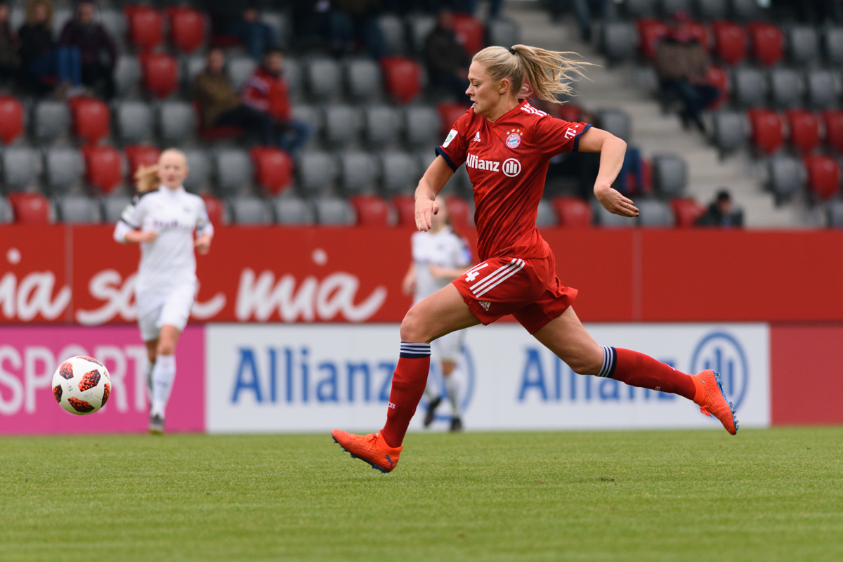 Fridolina Rolfö vs SGS Essen in April 2019